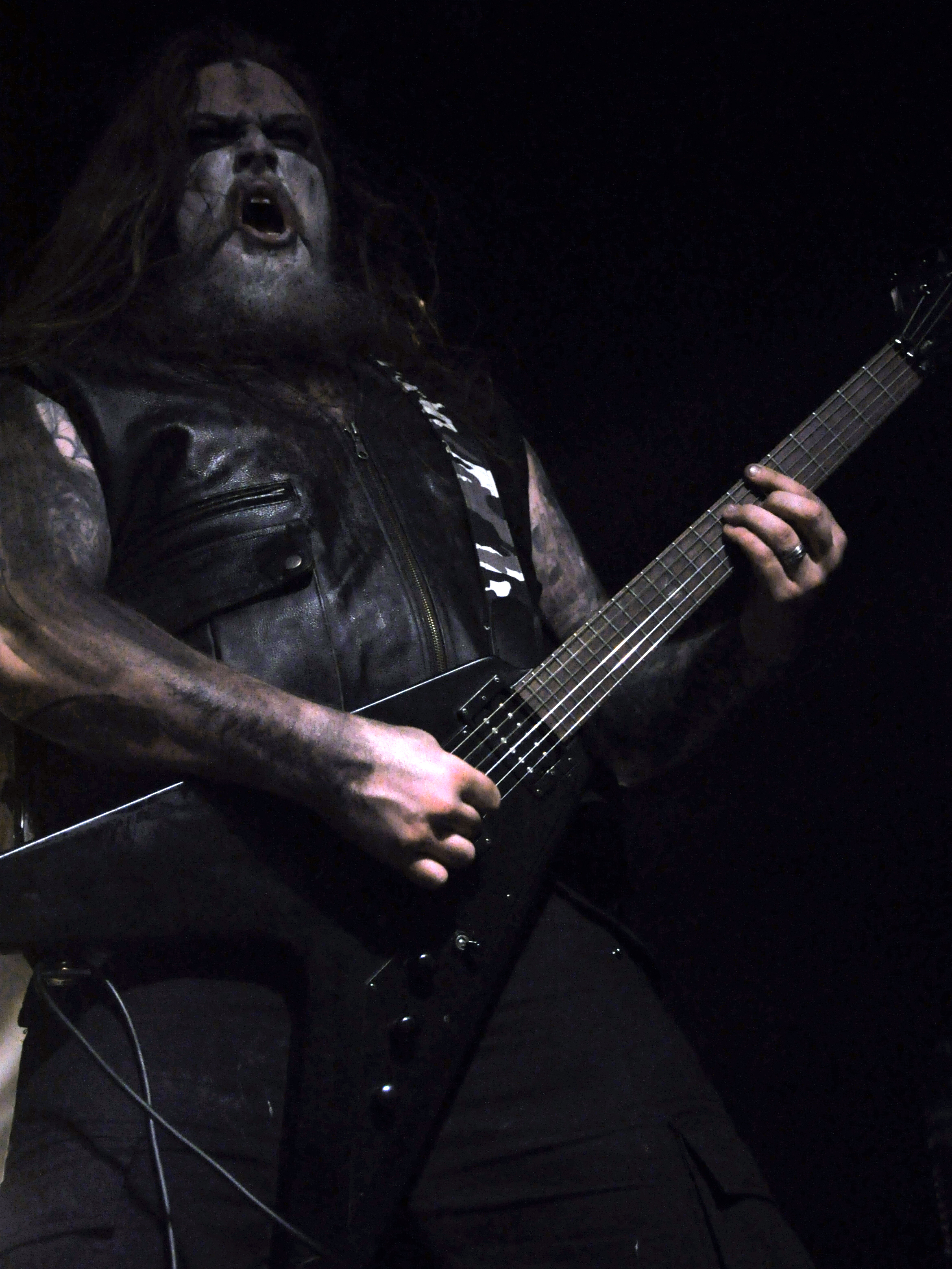 Setherial à Paris le 09/05/2009. Le groupe jouait au Black Metal Is Rising 5 organisé par les Acteurs de l'Ombre. Setherial est un groupe de Black Metal suédois.